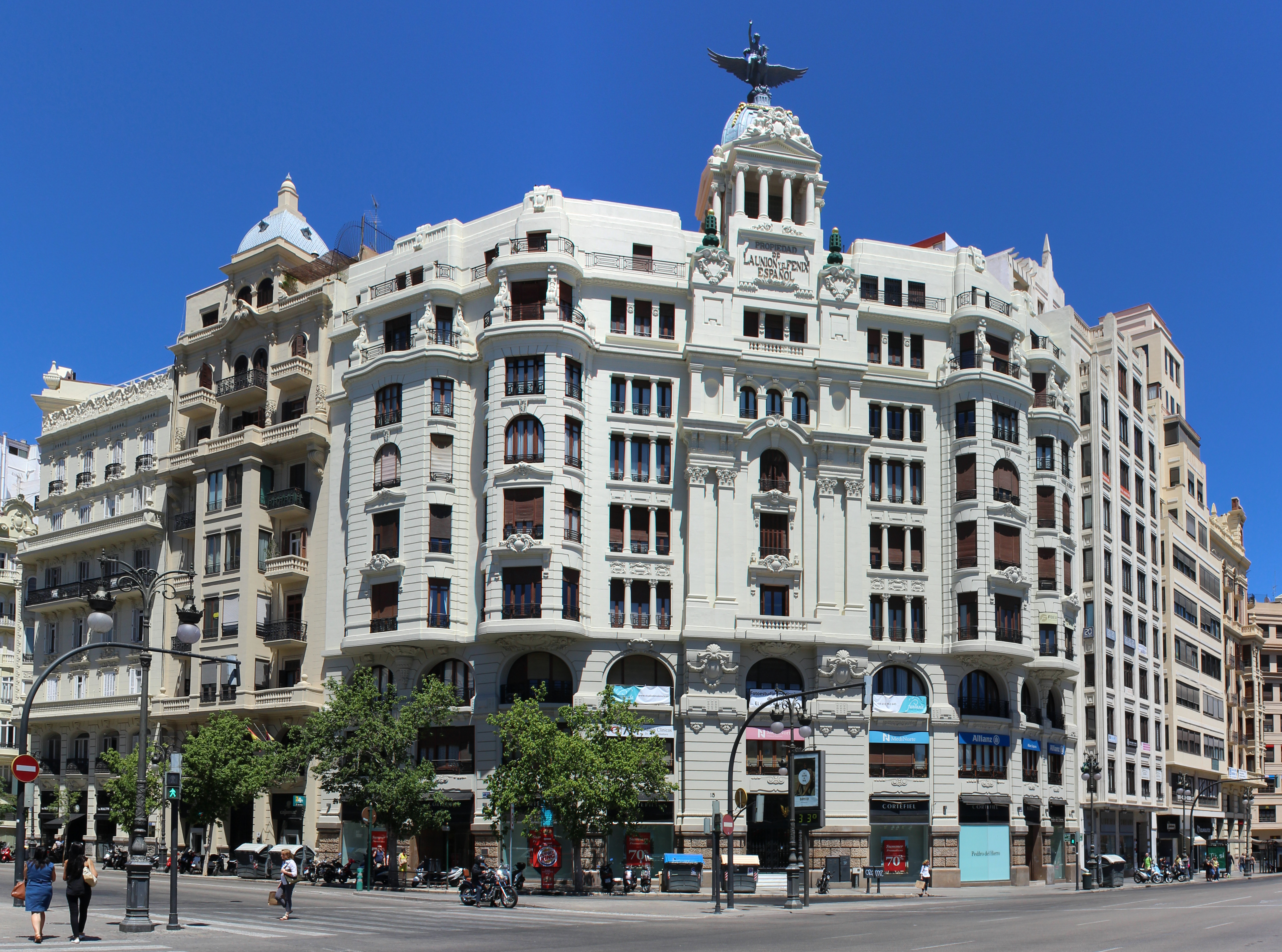 Edificio de La Unión y el Fénix Español situado en la calle Játiva con Marqués de Sotelo de la ciudad de Valencia y construido por el arquitecto Enrique Viedma Vidal